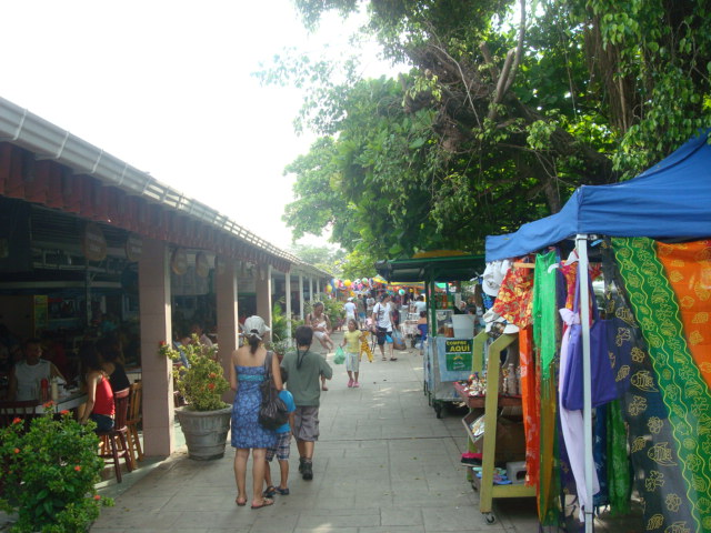 Boulevard del Paseo de los Turistas. Puntarenas. Costa Rica.